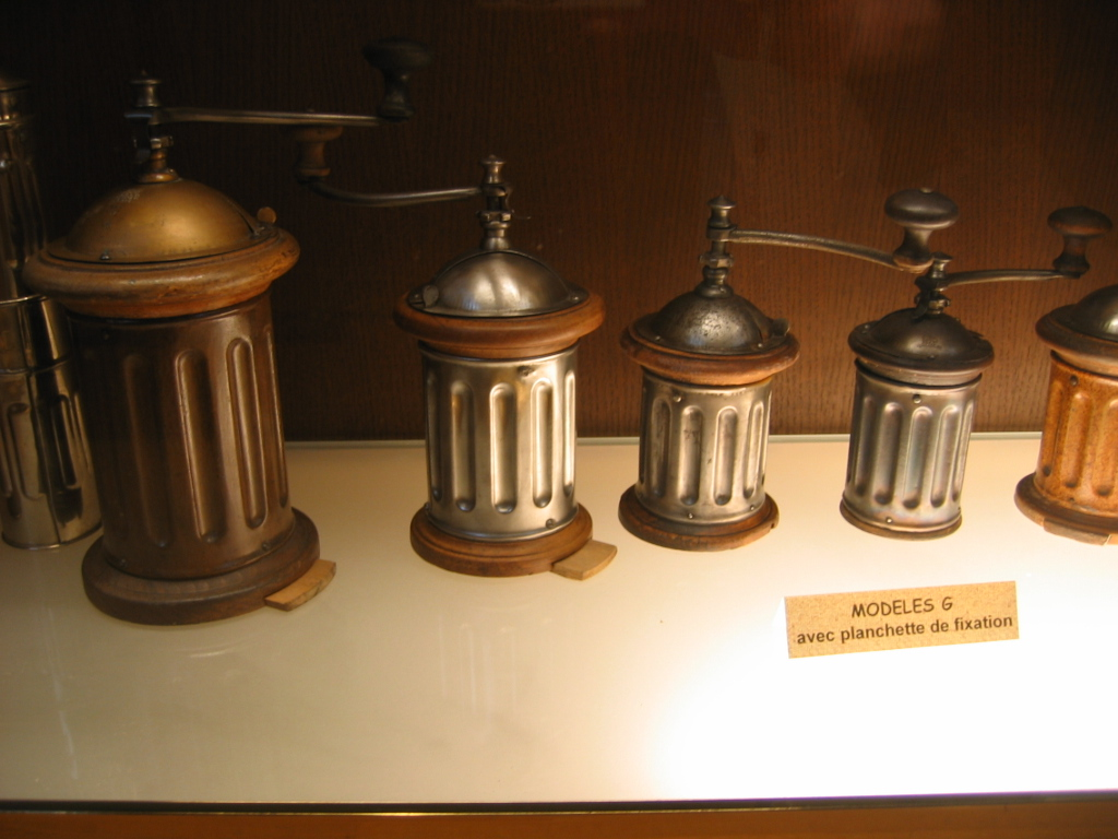 Moulin à Café Peugeot - Musée Peugeot Sochaux